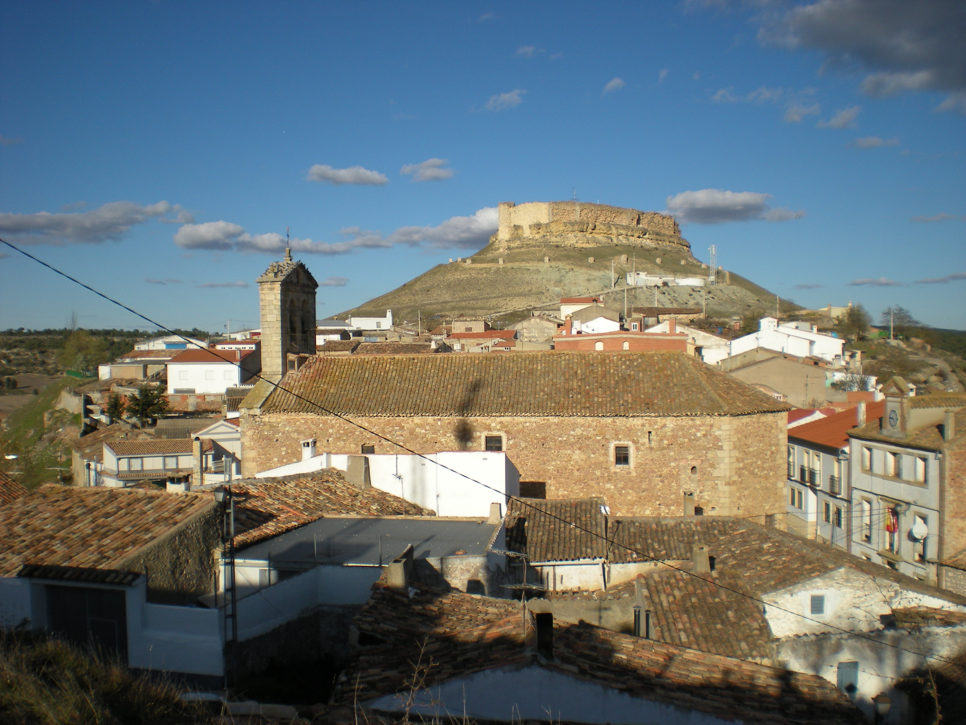 Vista de Monteagudo.